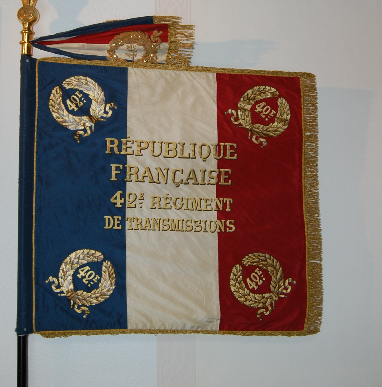 Le drapeau du 42eme Régiment de Transmissions (France).